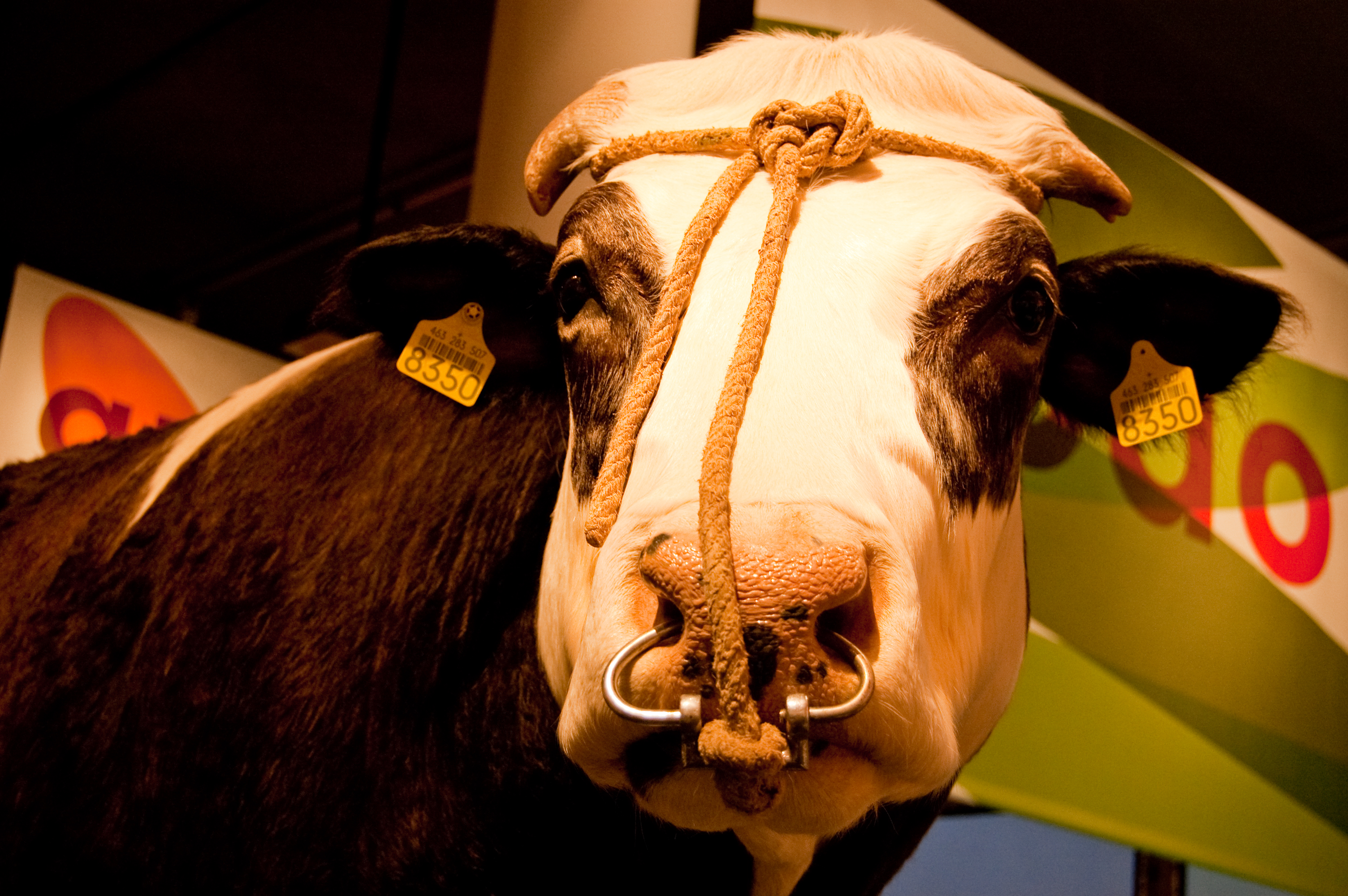 Wilde hond met zebra 04033 Stier Herman in de zaal Onderzoek en uitvoering van Naturalis